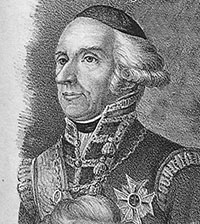 Johan Frans Pollett (1729-1801)